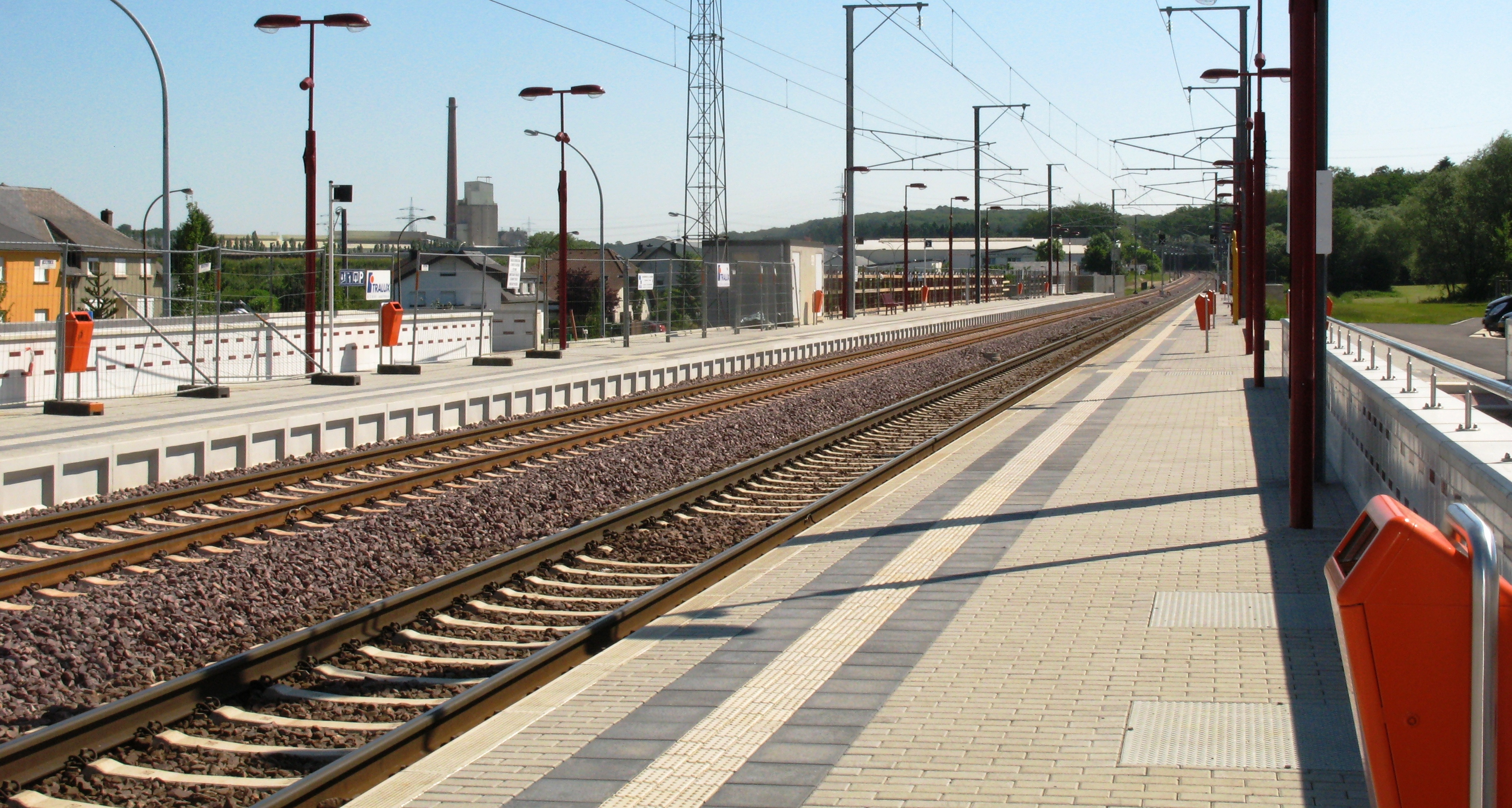 La gare de Bascharage-Sanem (Luxembourg) vue en direction de Luxembourg